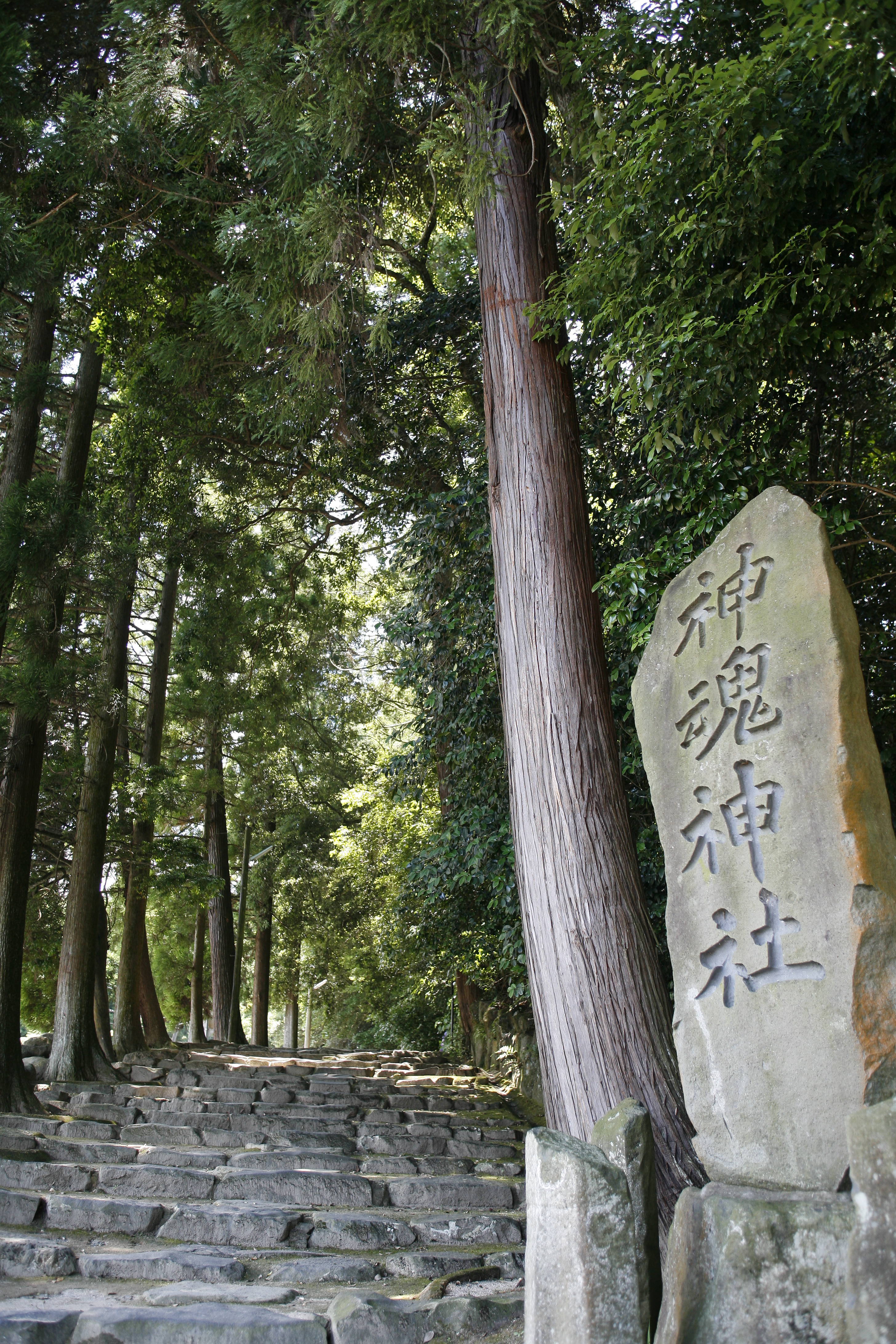 Kamosu Shrine in Matsue, Japan - 松江市の神魂神社